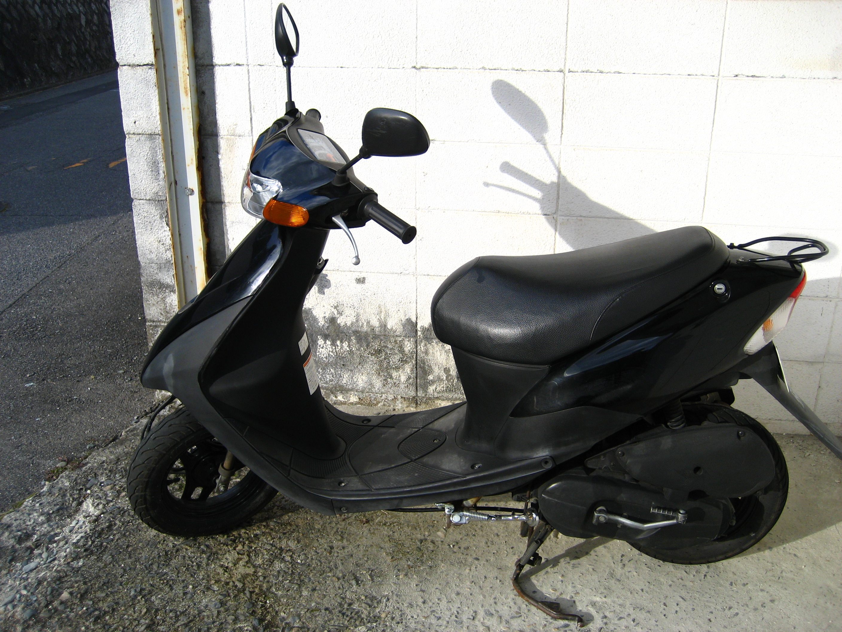 レッツ2です。